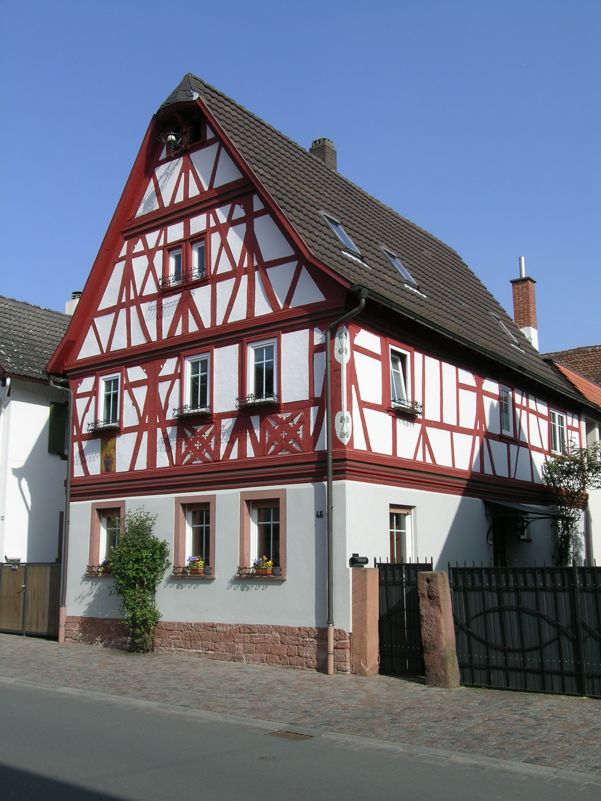 Bauernhaus, giebelständiger Schopfwalmdachbau mit Zierfachwerkobergeschoss, 1644, Erdgeschoss verändert; Scheune, Fachwerkscheune mit Satteldach und kleinem abgeschlepptem Anbau, vor 1844, Freudenbergstr. 46 Bürgstadt